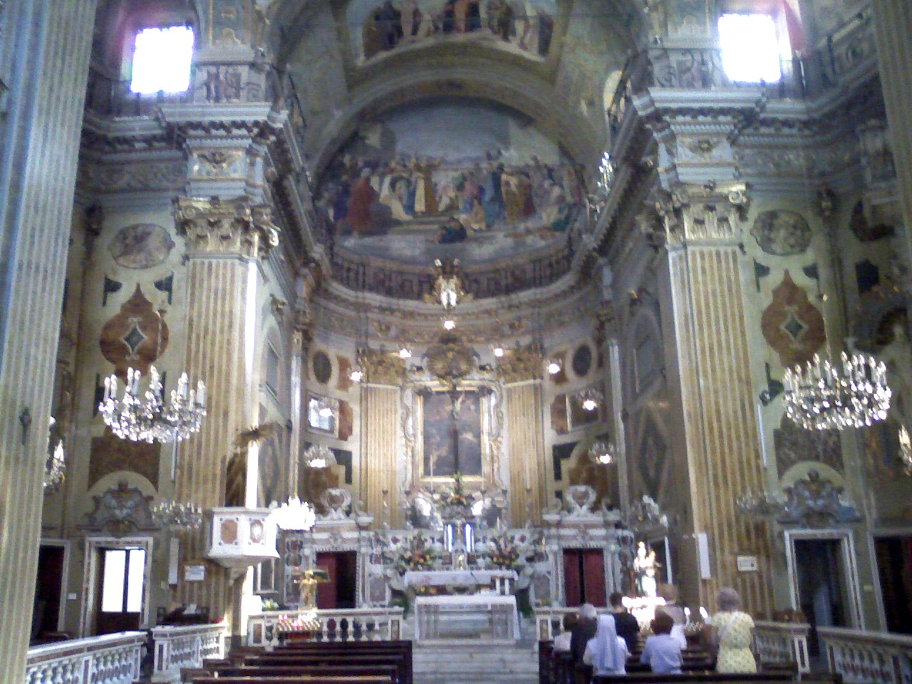 Antonello Piccone, chiesa di San Pietro (Savona)